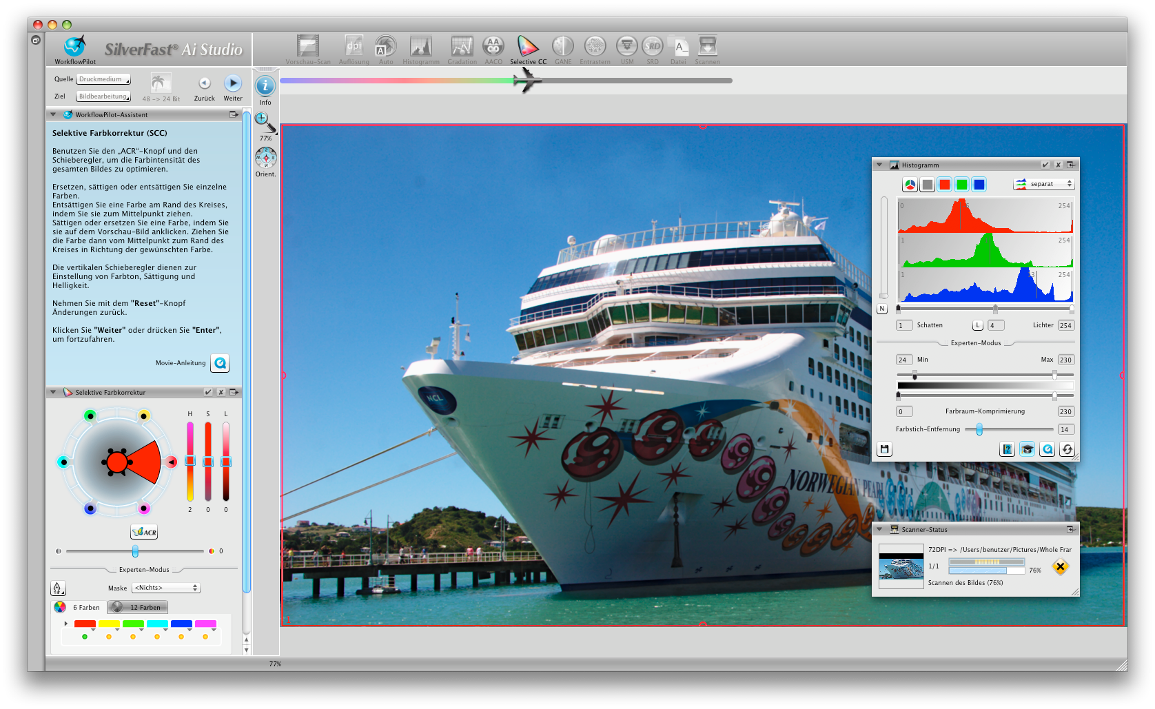 Screenshot des Programms SilverFast Ai Studio